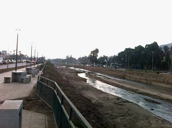 Río Copiapó en la actualidad